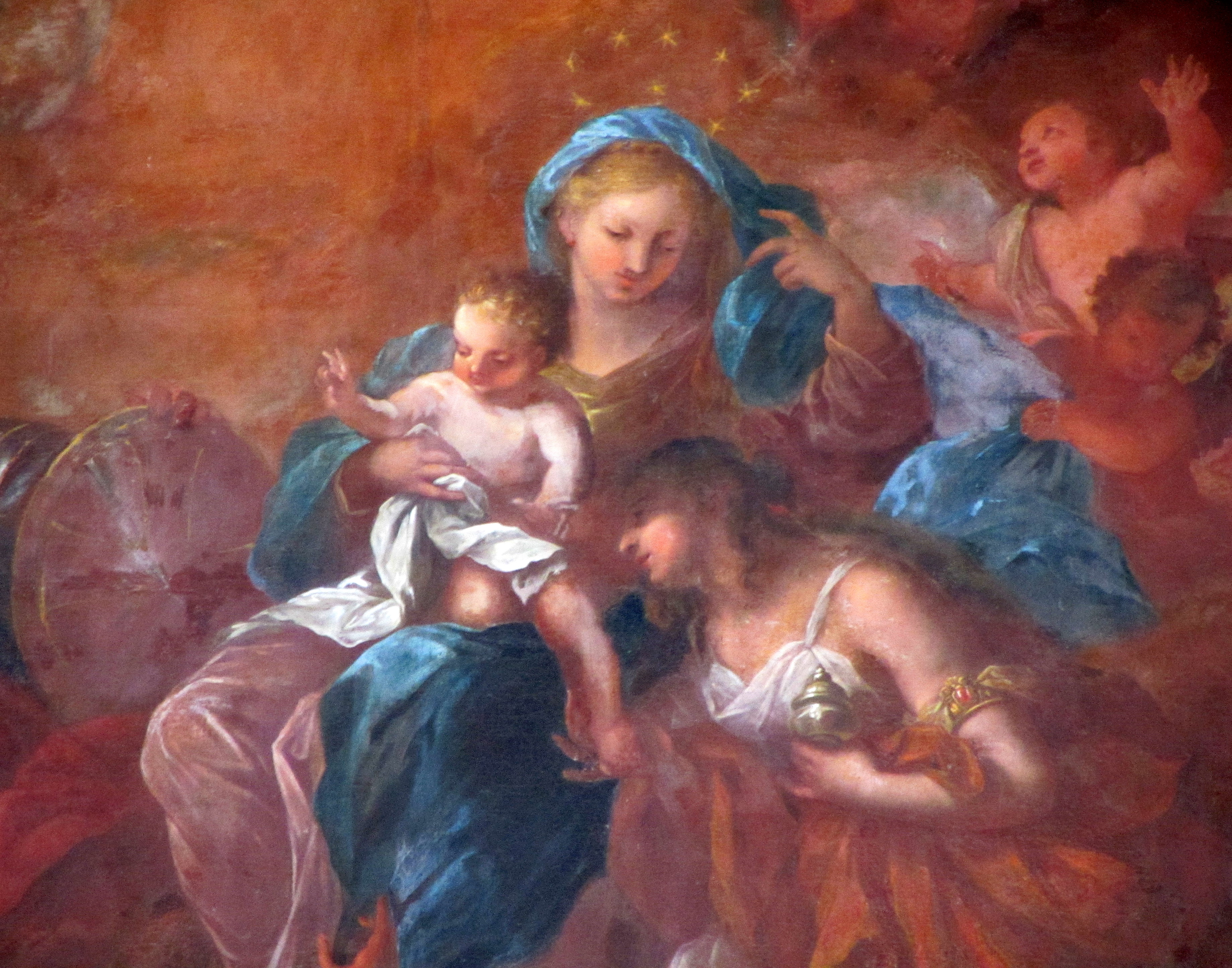 Hochaltarbild St. Martin - Maria, Kind und Maria Magdalena